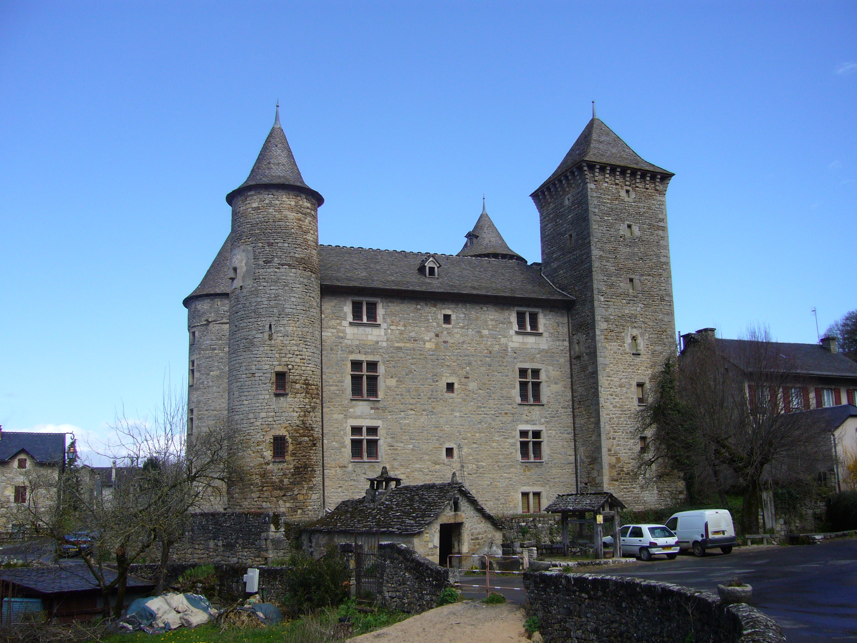 Le village de Saint-Saturnin, Lozère, France